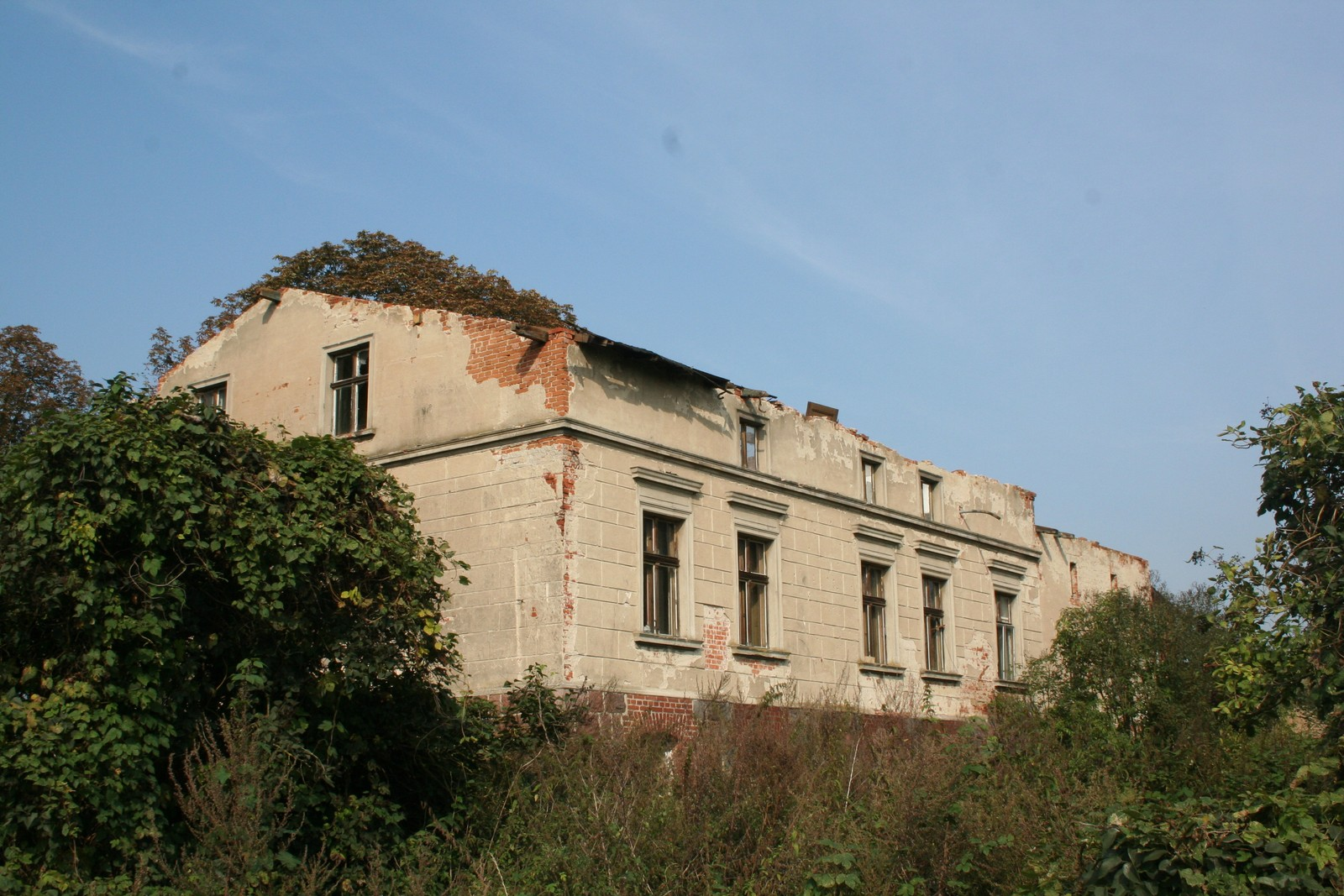 dwór z przełomu XIX/XX w. w Karolewie, pow. grudziądzki